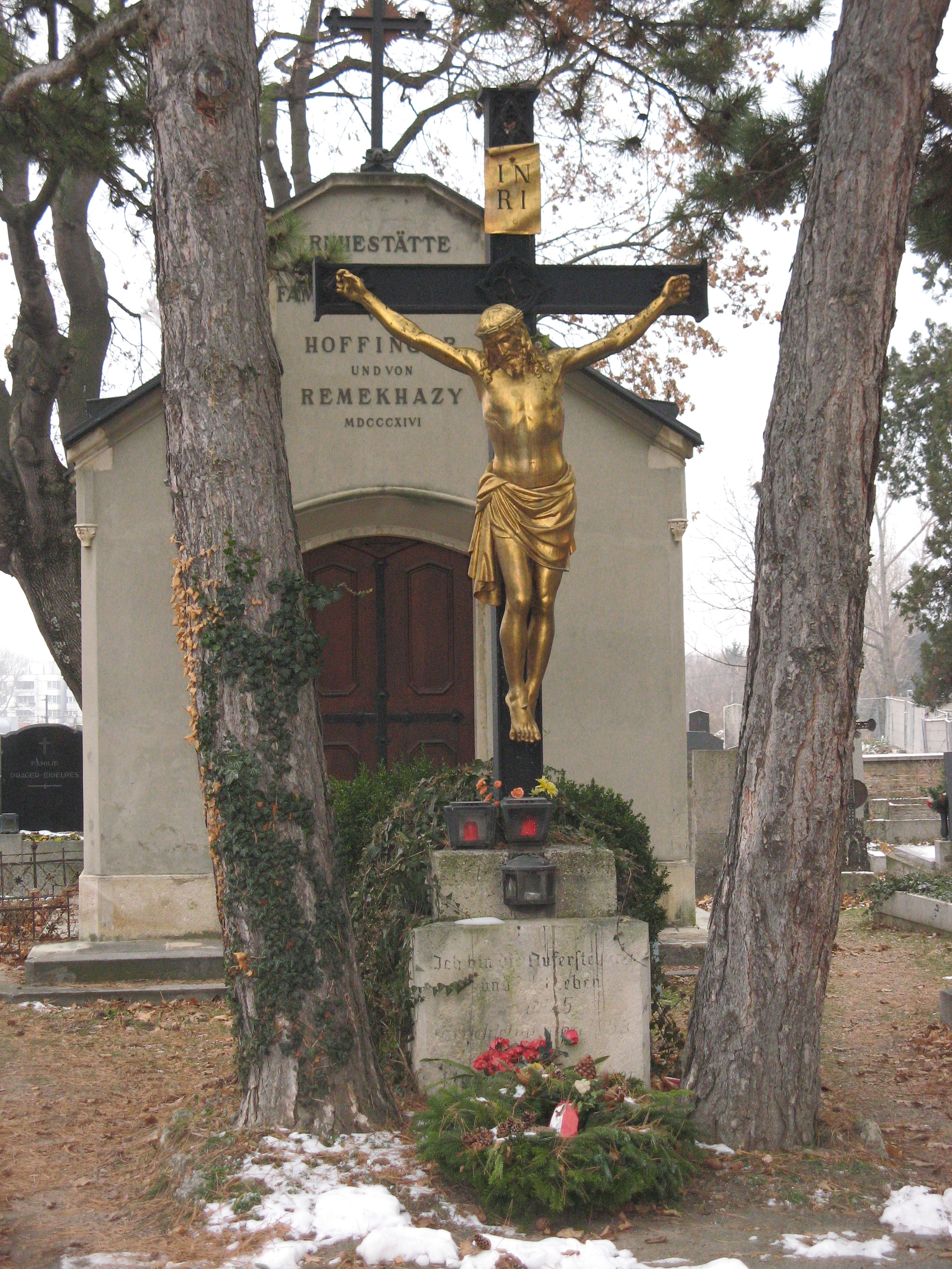 Friedhofskreuz auf dem Altmannsdorfer Friedhof in Wien-Meidling